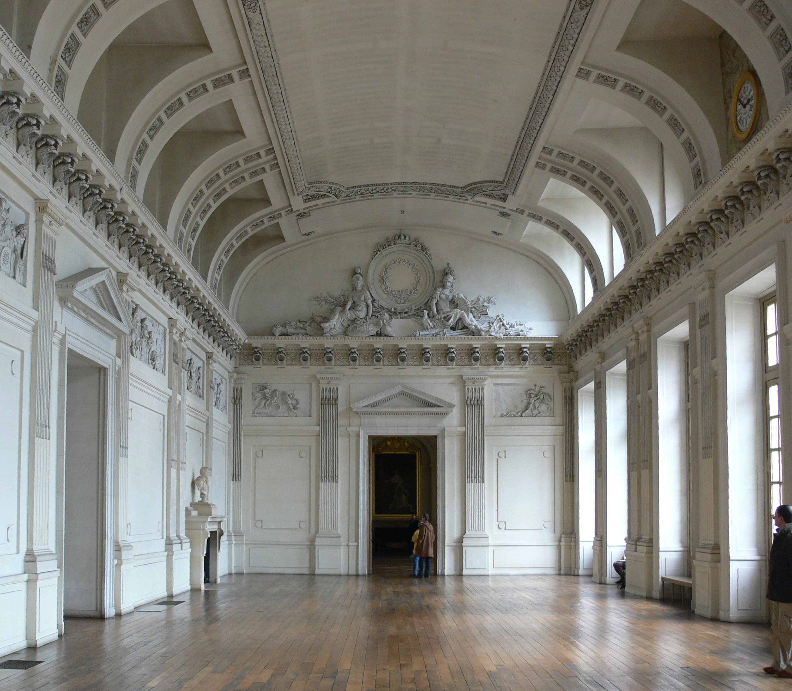 Compiègne, France: Château de Compiègne Les appartements historiques Salle des Gardes du Roi, 1784